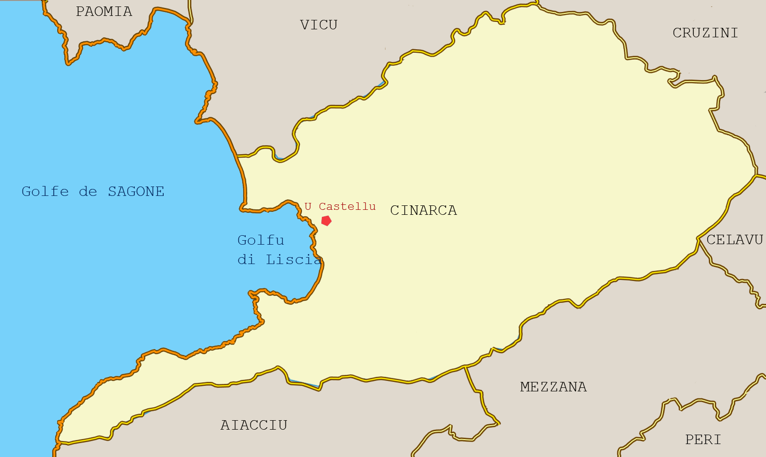 Pieve de Cinarca (Corse), croquis créé avec Géoportail (plan IGN)